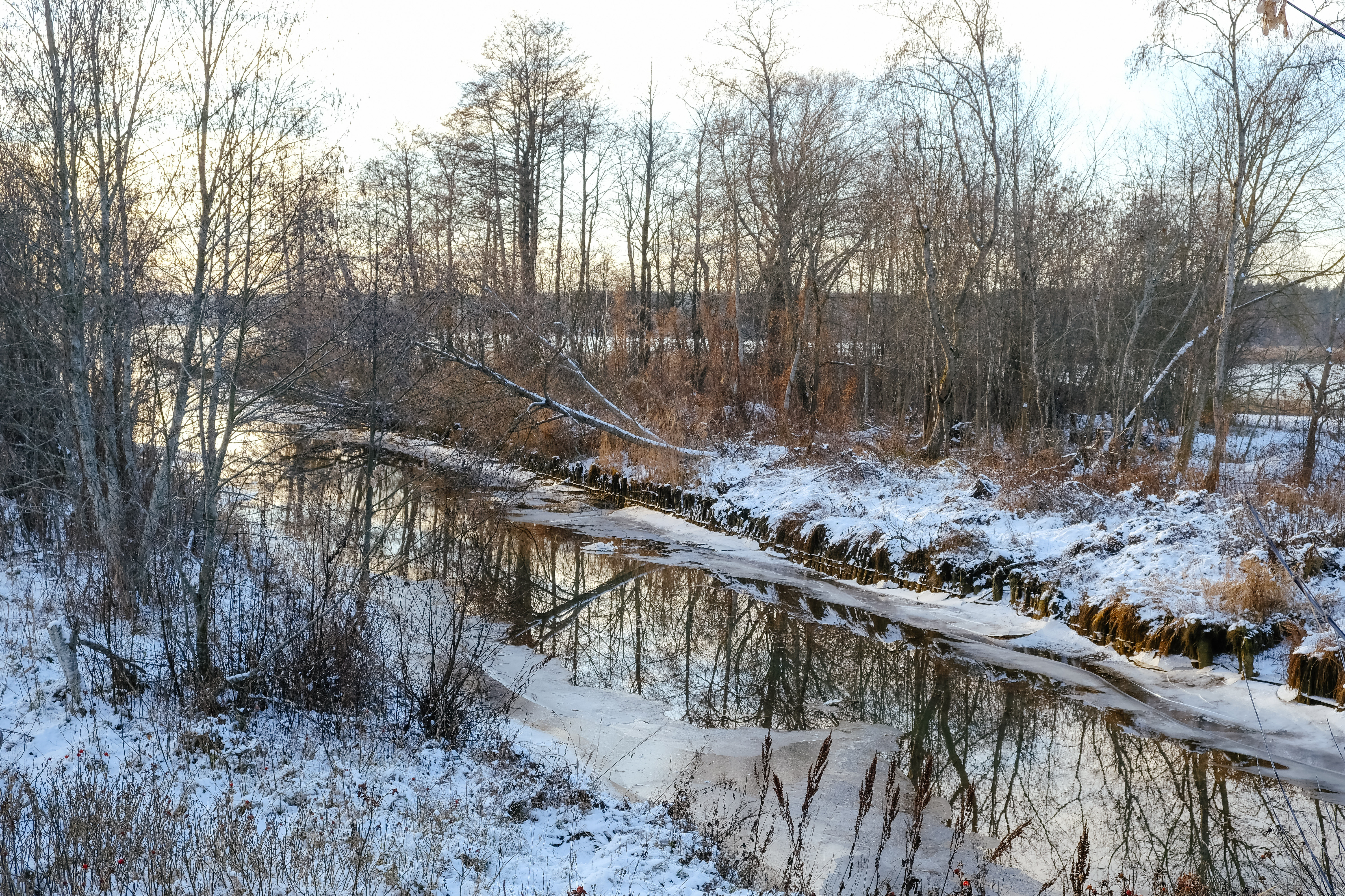 Juglas - Baltezera kanāls pie Alderiem ietekot Mazajā Baltezerā.